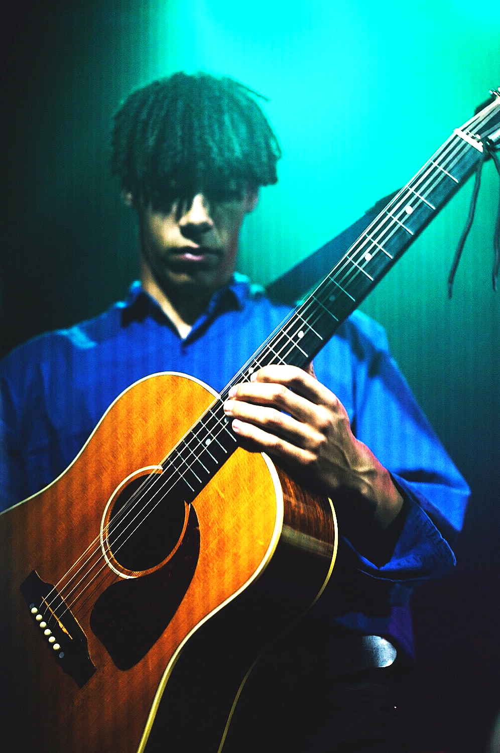 Inhaler, Waterfront